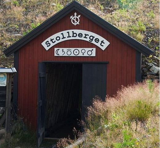 Ingång till Stollbergs Västra Stollgång.